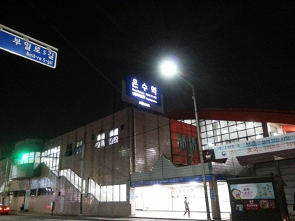 온수역. 서울특별시 구로구 온수동 51-7 1호선 온수역(도로명주소：서울특별시 구로구 부일로 872)